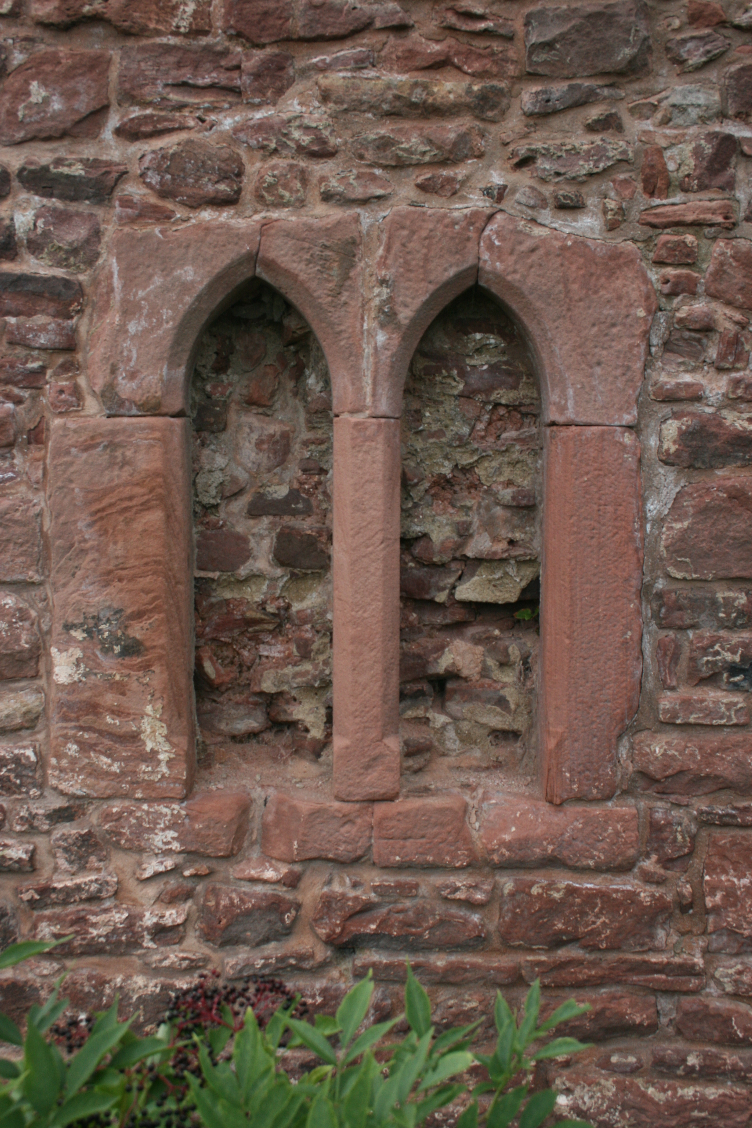 Burgruine Freienstein, vermauertes gotisches Doppelfenster einer früheren Bauphase.